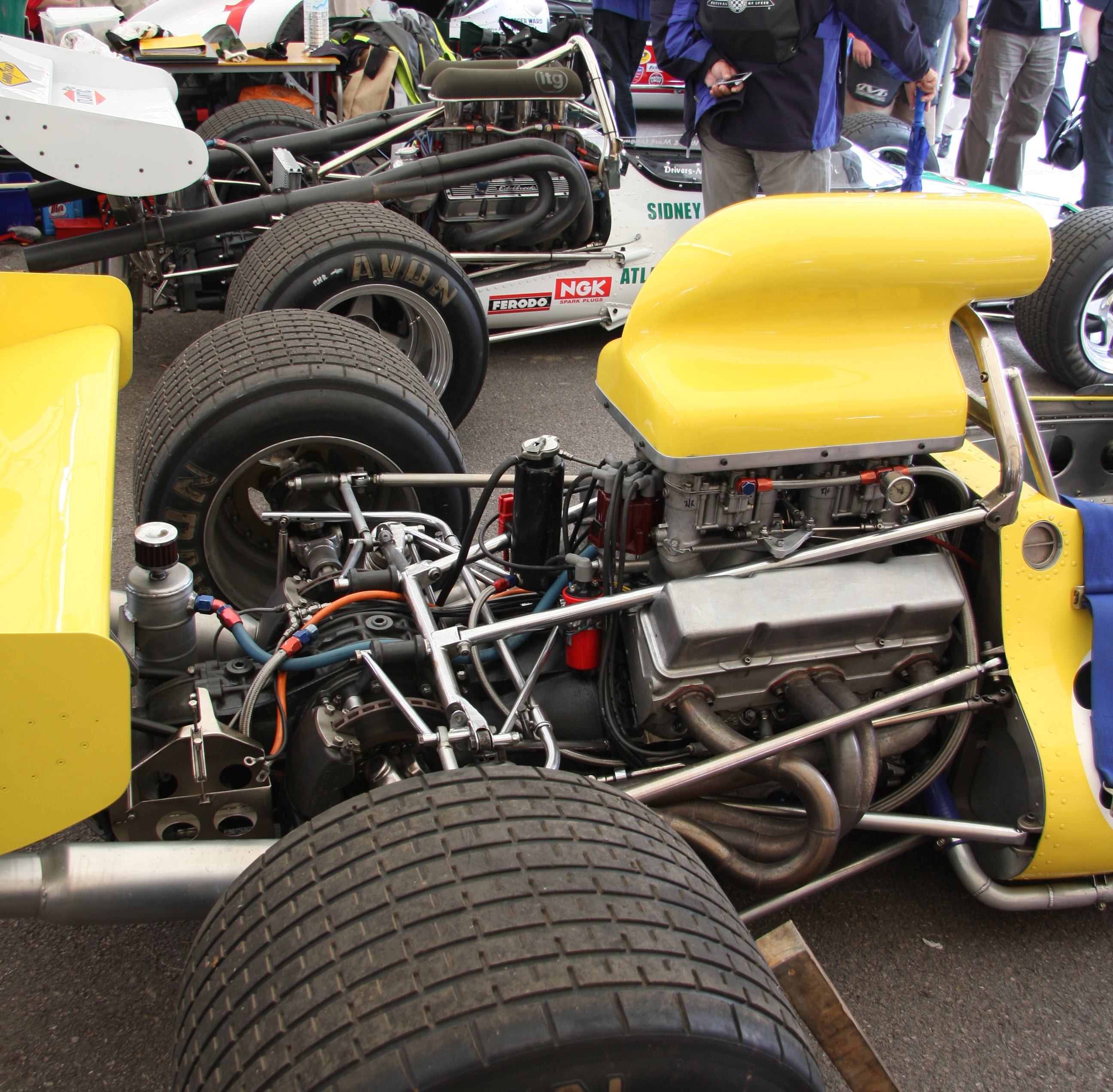 McRae-Chevrolet GM1 / McLaren-Chevrolet M10B